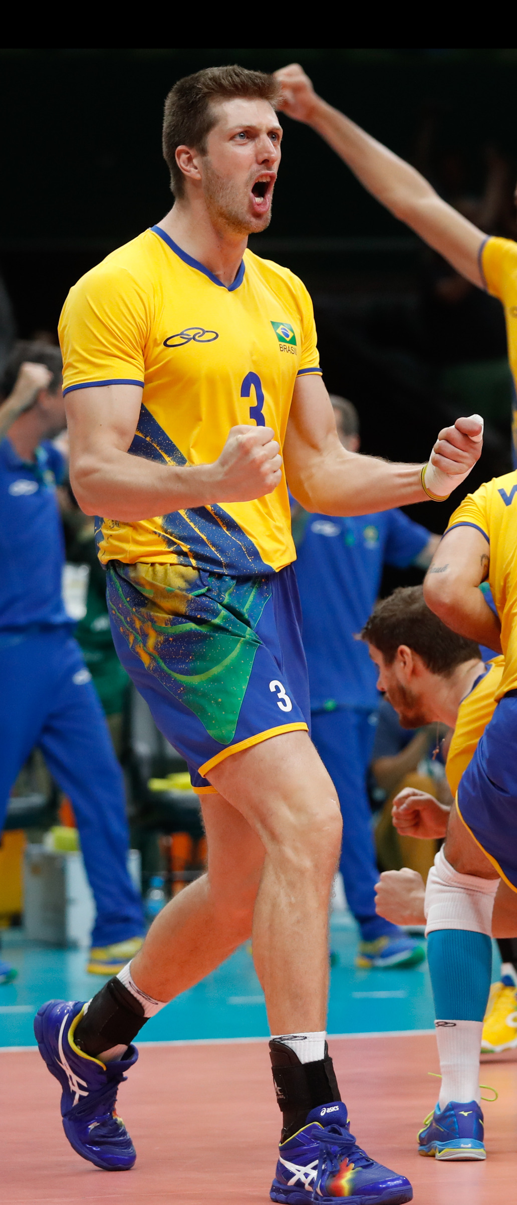 Rio de Janeiro - Seleção brasileira masculina de vôlei vence a da França por 3 sets a 1 no Maracanãzinho e vai às quartas-de-final (Fernando Frazão/Agência Brasil)